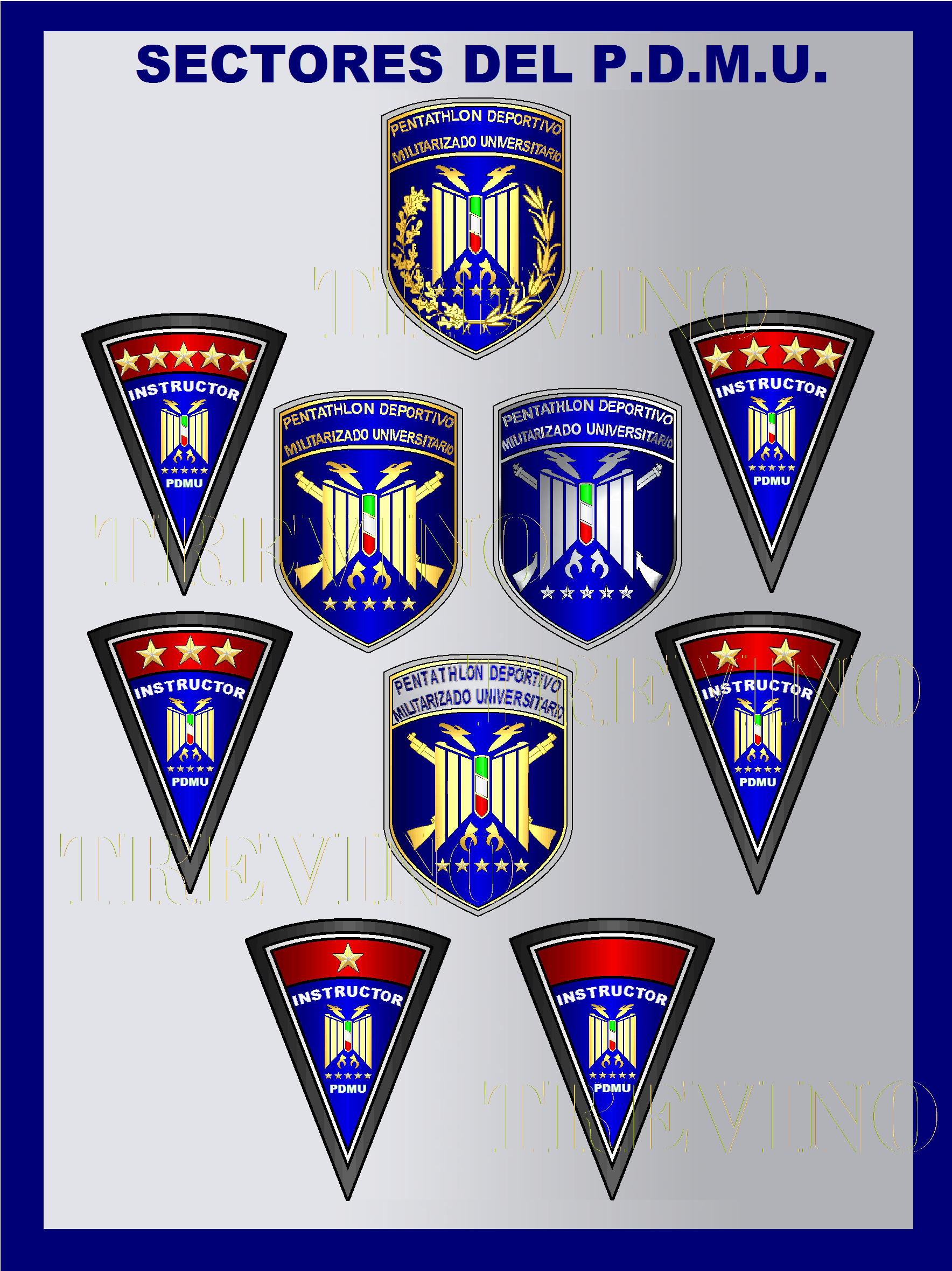 Sectores del PDMU. Cmte Gral, Comandantes, Oficiales, Tropa e Instructores